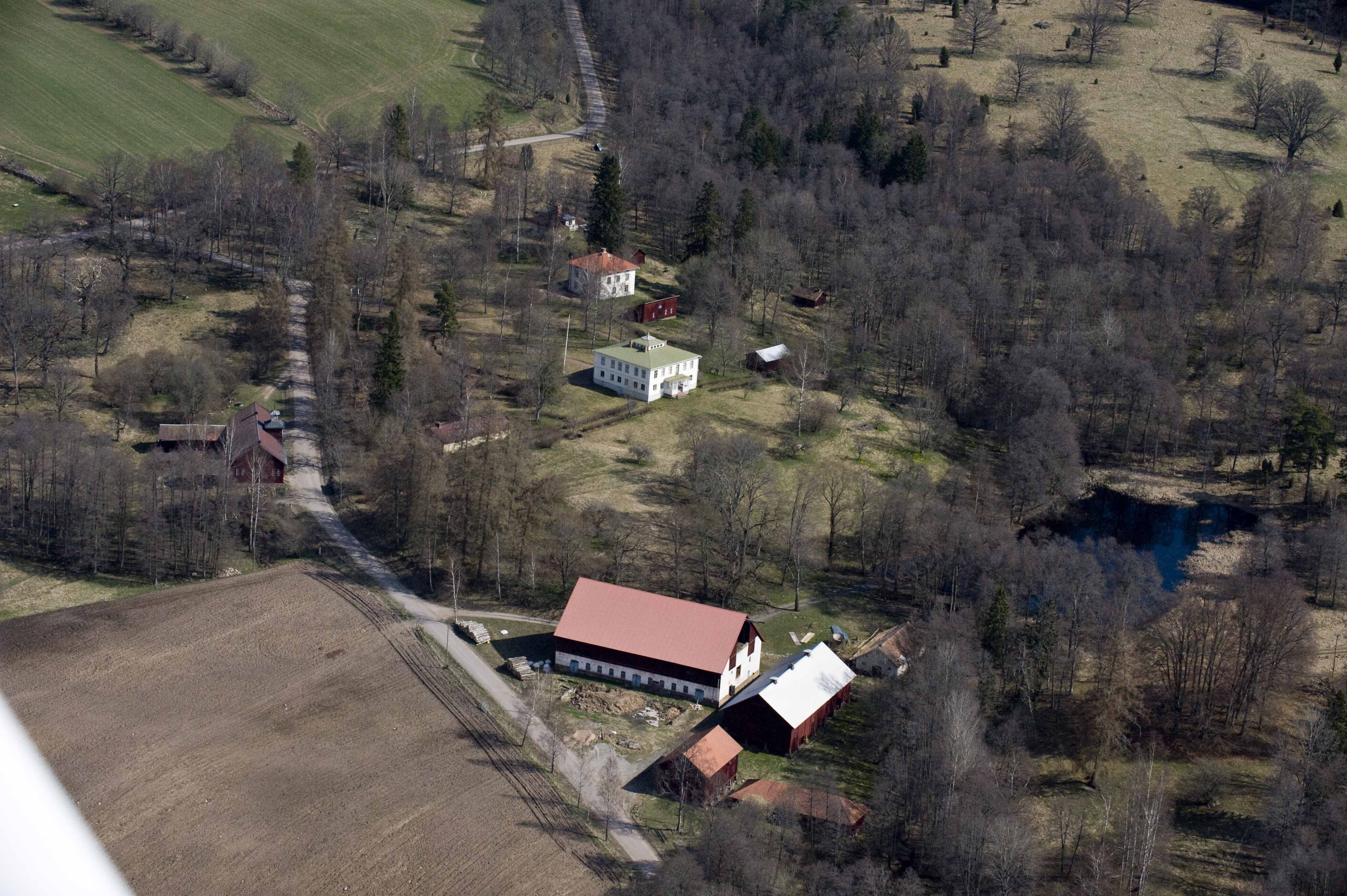 Knutstorps herrgård från ovan